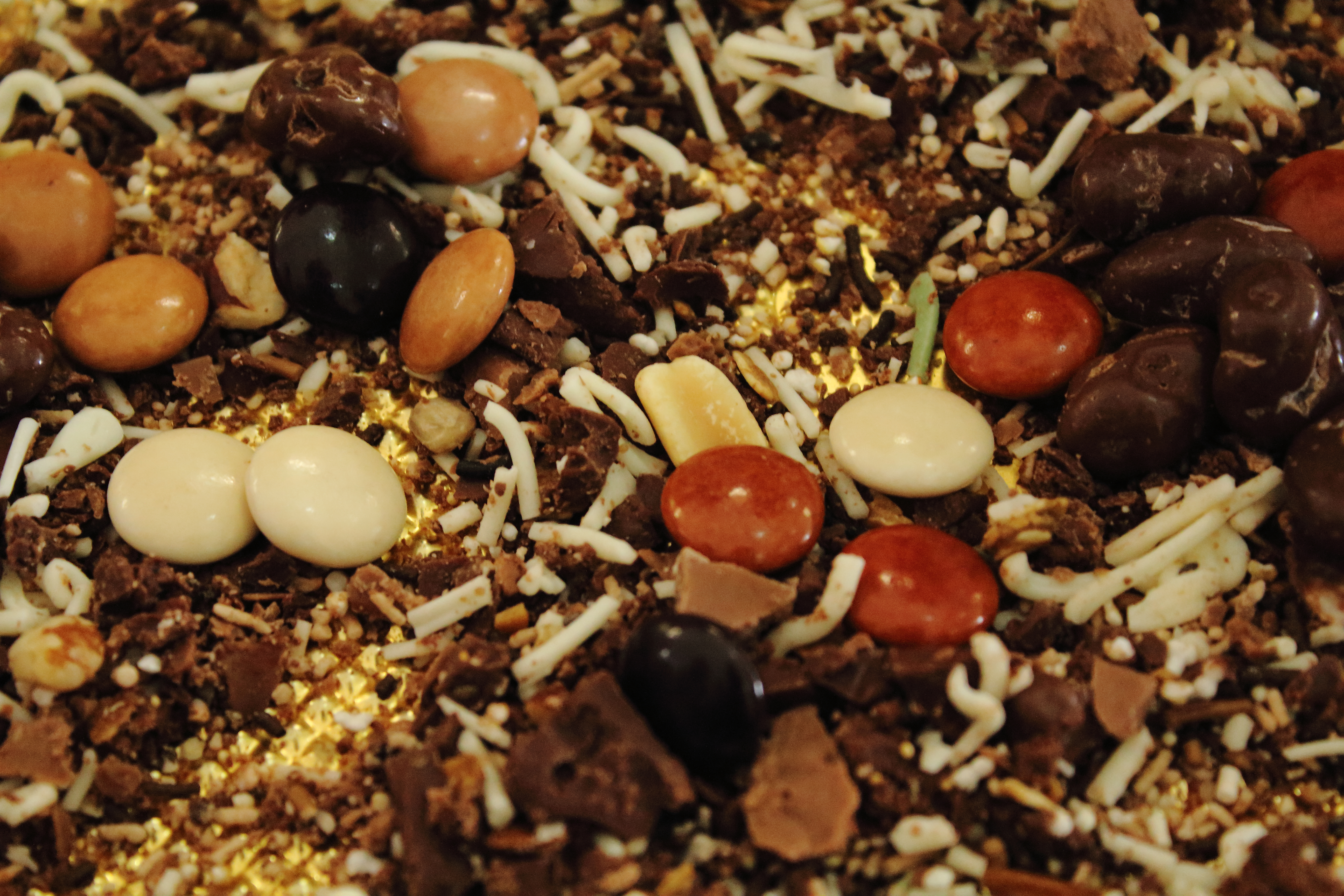 Variedad de chocolates.